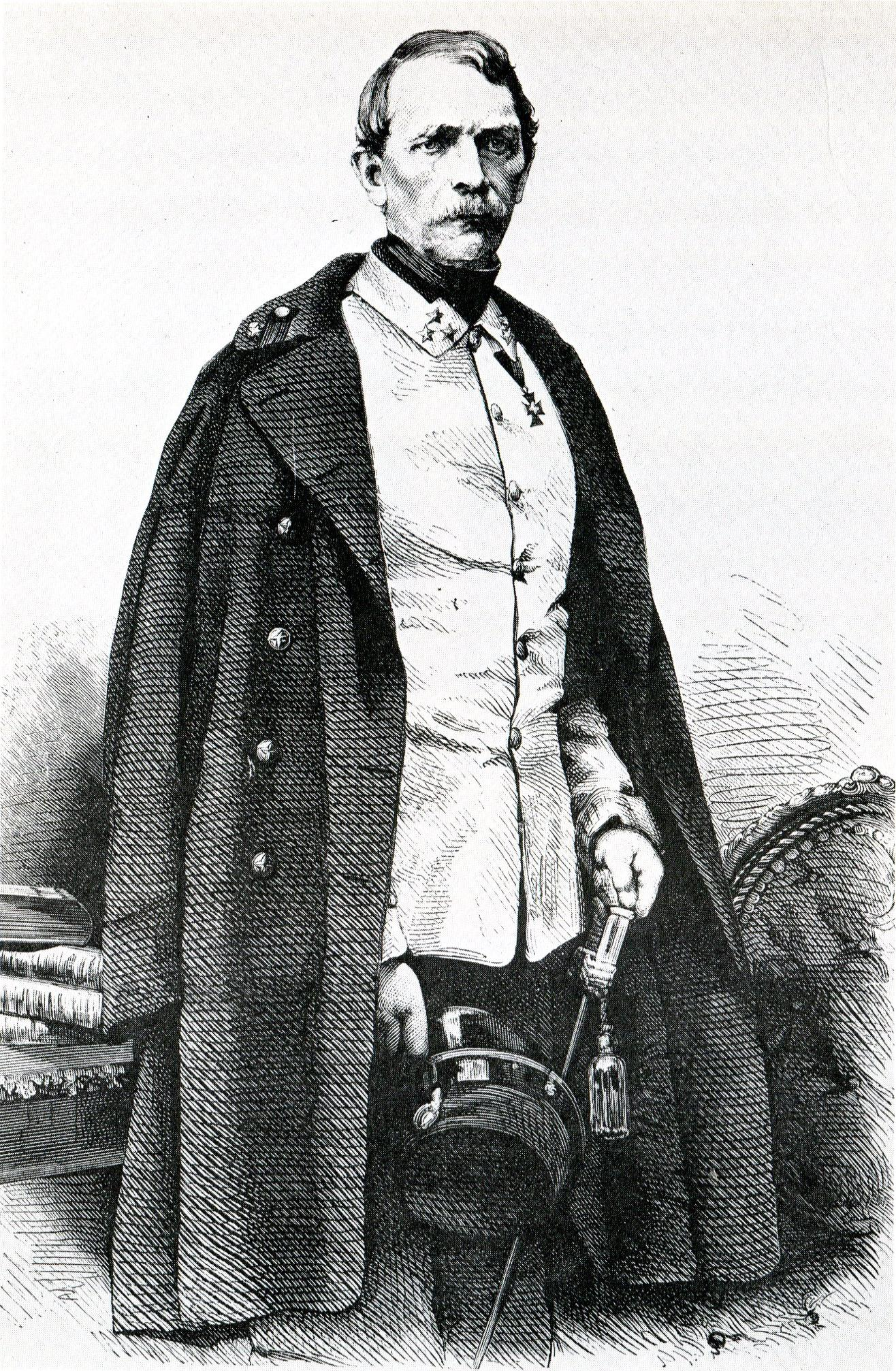 Ks. Gustaw Waza w starszym wieku.